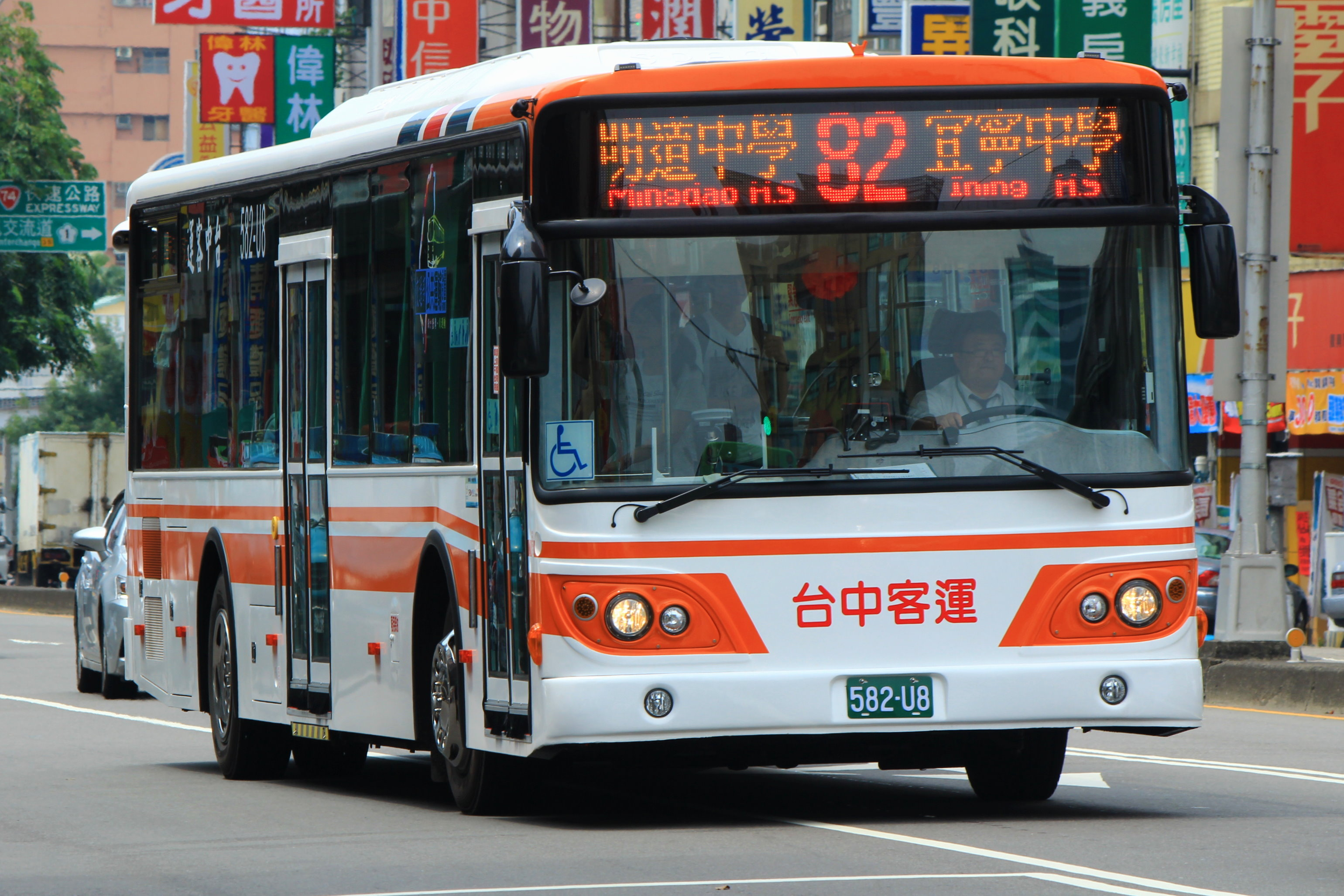 中文（台灣）: 台中高工(復興路)